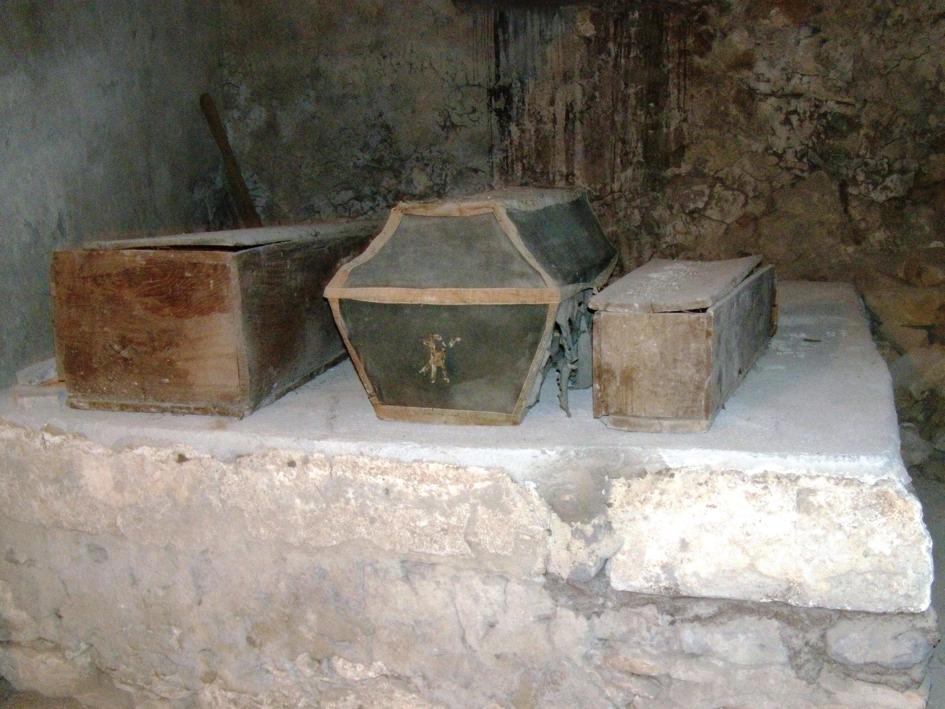 Alcune "connole" (bare) nella Cripta sepoltura di Cerreto Sannita sottostante la chiesa di San Rocco in Cerreto Sannita (Bn)